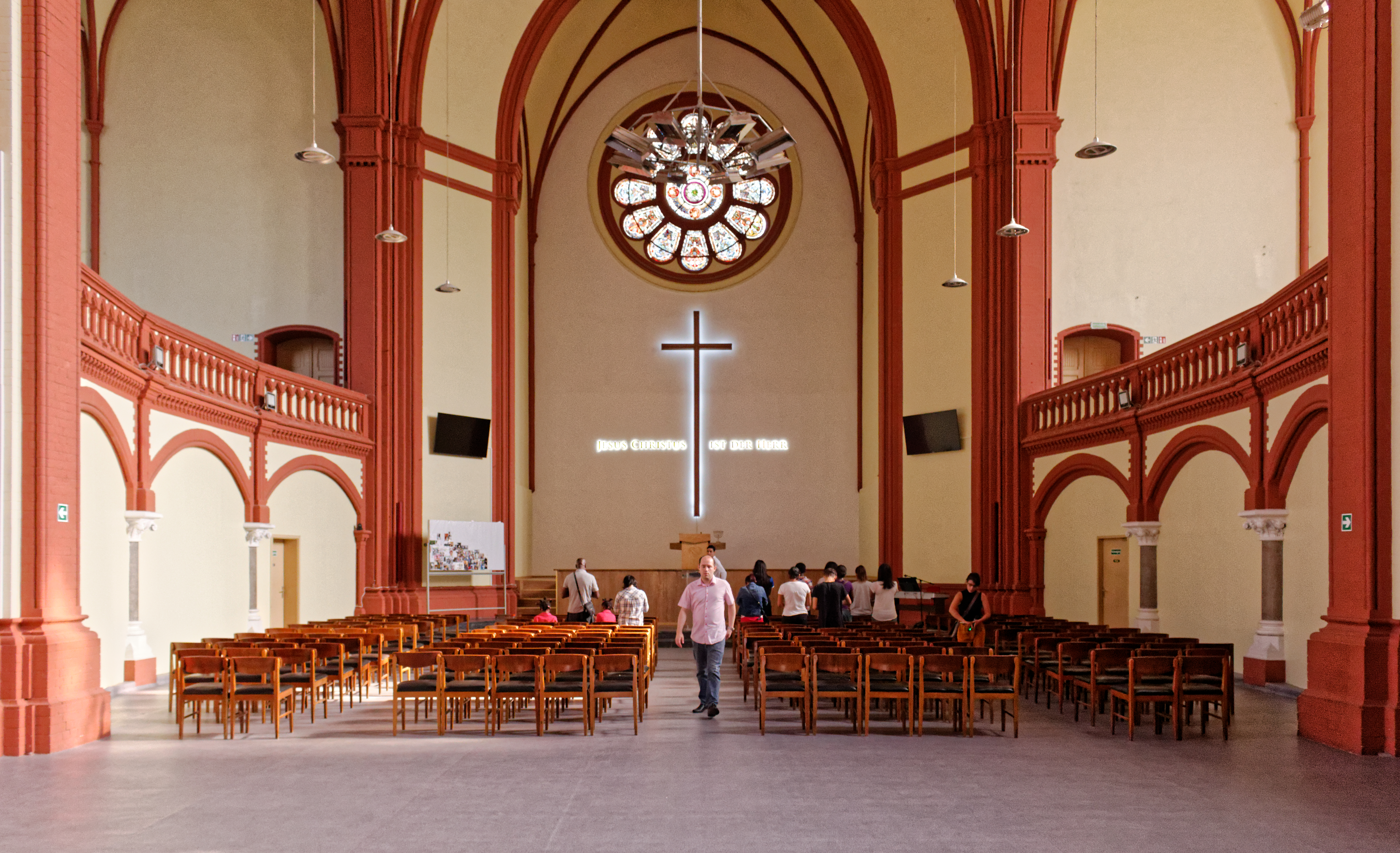 Innenraum der Neue Nazarethkirche im Berliner Ortsteil Wedding